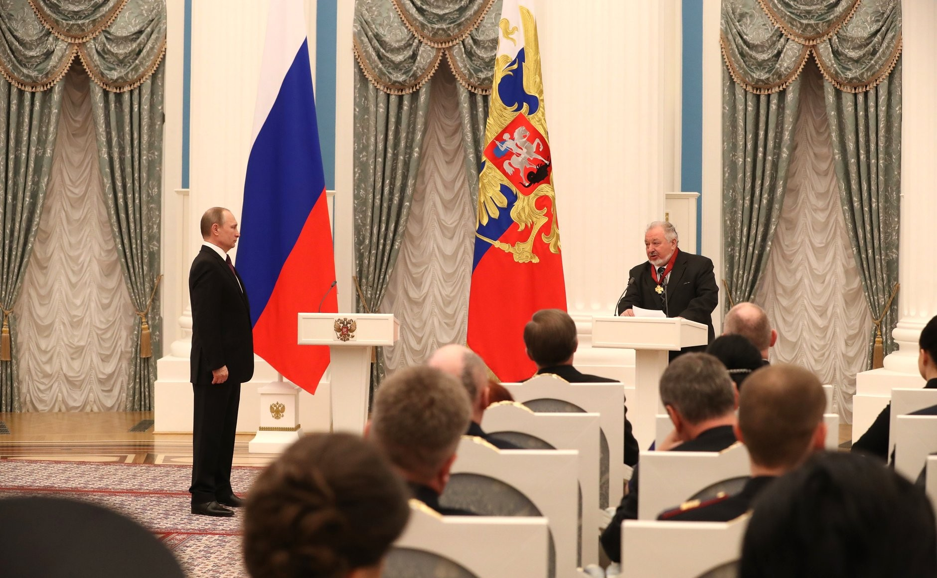 Церемония вручения государственных наград Российской Федерации. Орденом «За заслуги перед Отечеством» II степени награждён академик Российской академии наук Алексей Конторович